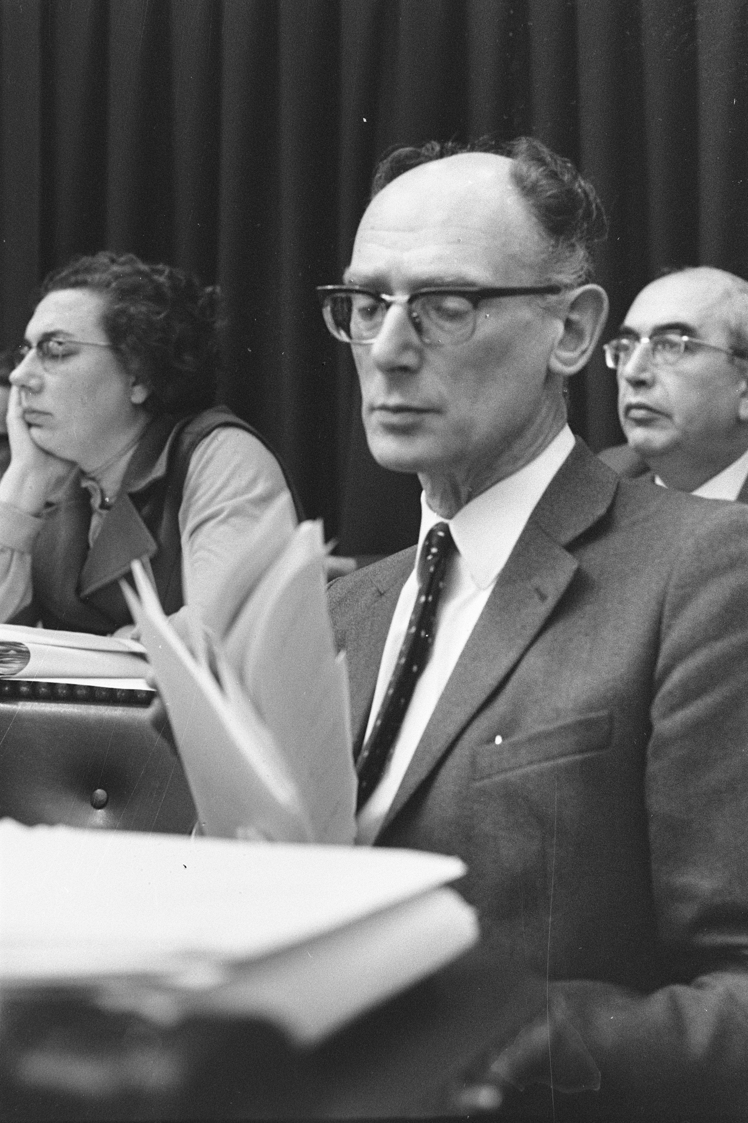 Collectie / Archief : Fotocollectie Anefo Reportage / Serie : [ onbekend ] Beschrijving : Kamerdebat over de vrijlating van de Drie van Breda; kamerlid Voogd (PvdA) in de Tweede Kamer in Den Haag Datum : 29 februari 1972 Locatie : Den Haag, Zuid-Holland Trefwoorden : kamerleden, parlementaire debatten, politiek Persoonsnaam : Voogd, Joop Fotograaf : Verhoeff, Bert / Anefo Auteursrechthebbende : Nationaal Archief Materiaalsoort : Negatief (zwart/wit) Nummer archiefinventaris : bekijk toegang 2.24.01.05 Bestanddeelnummer : 925-4236